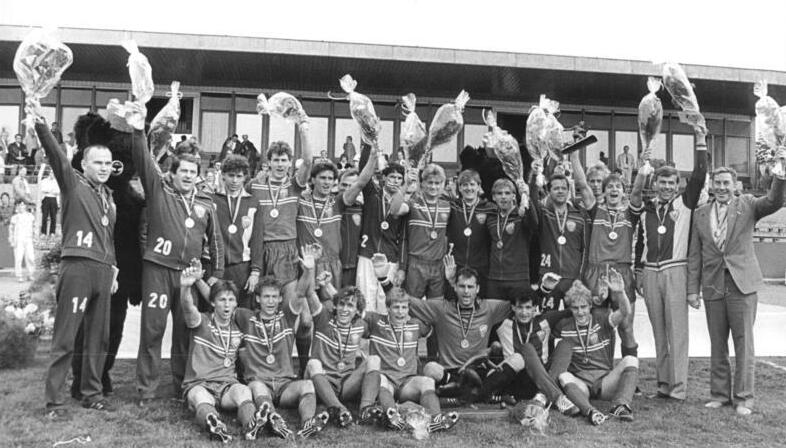 ADN-ZB-Ritter-6.6.87-kb-Berlin: Fußball-Oberliga-Abschluß. Mit einem 2:0 (2:0) Heimsieg gegen den FC Karl-Marx-Stadt verabschiedete sich in der Schlußrunde der DDR-Fußballmeisterschaft der alte und neue Titelträger BFC Dynamo aus der Saison 1986-87. Der nun neunfache Champion beendete das Spieljahr mit einem Sechs-Punkte-Vorsprung vor Vizemeister Dynamo Dresden. Freude der Mannschaft über die Trophäe, die sie zum Spielende überreicht bekam.